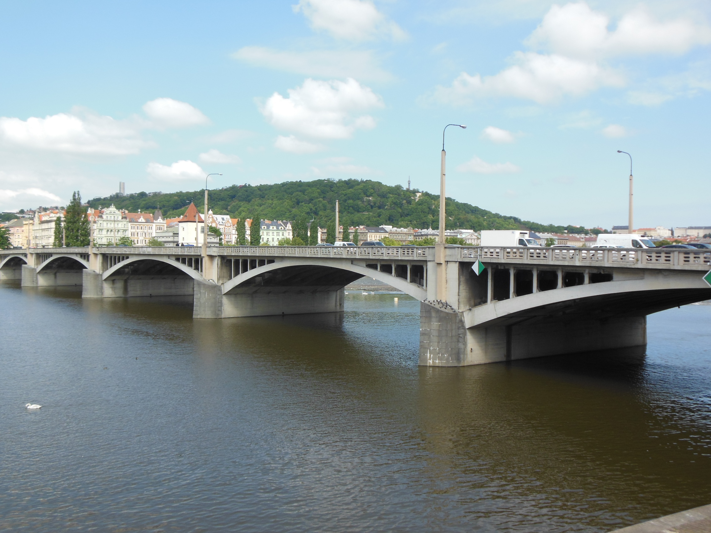 Pohled z Rašínova nábřeží na Jiráskův most v Praze.